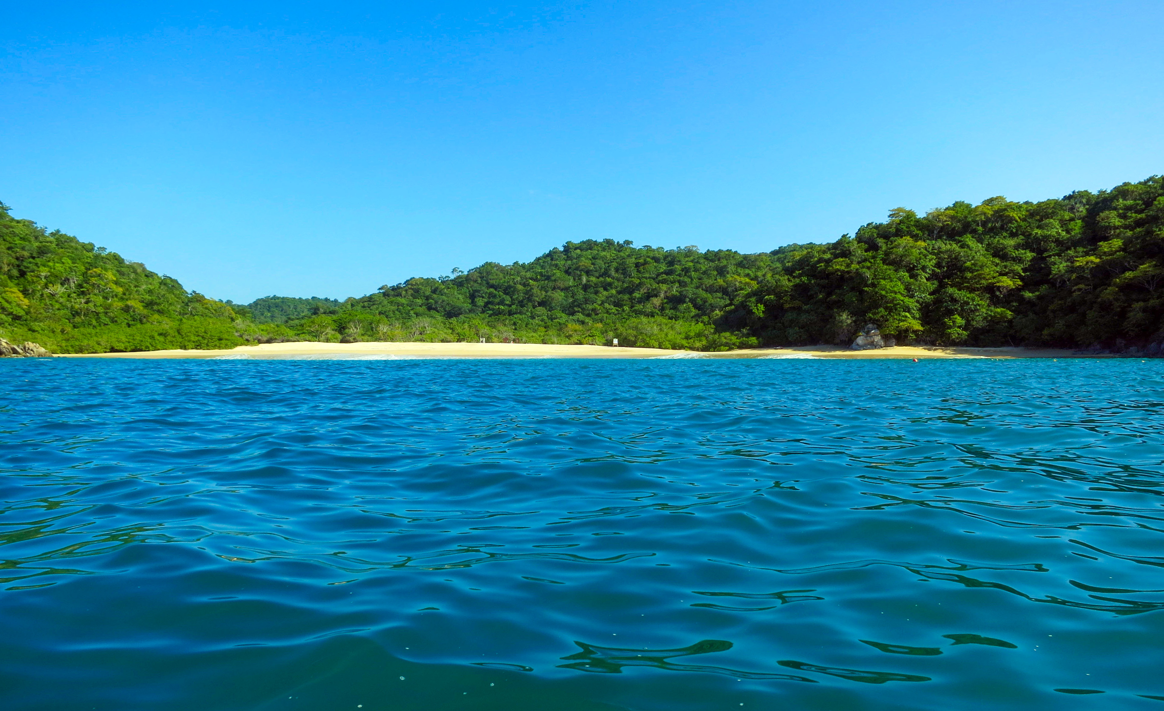 Bahías de Huatulco